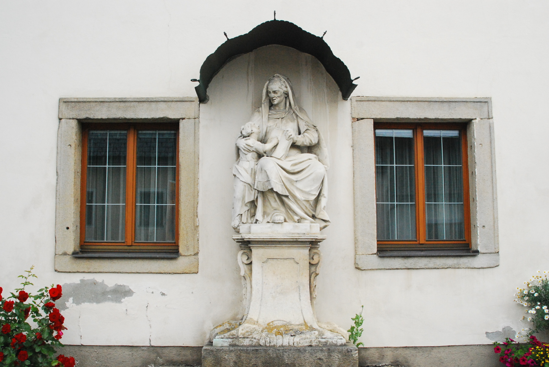 "Heilige Anna mit Maria" an der Fassade des Herrenhauses in Arbesbach in Niederösterreich